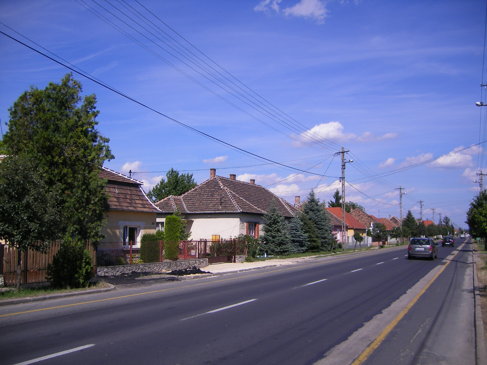 Dél-Komárom - Szőnyi utca (1-es főút)